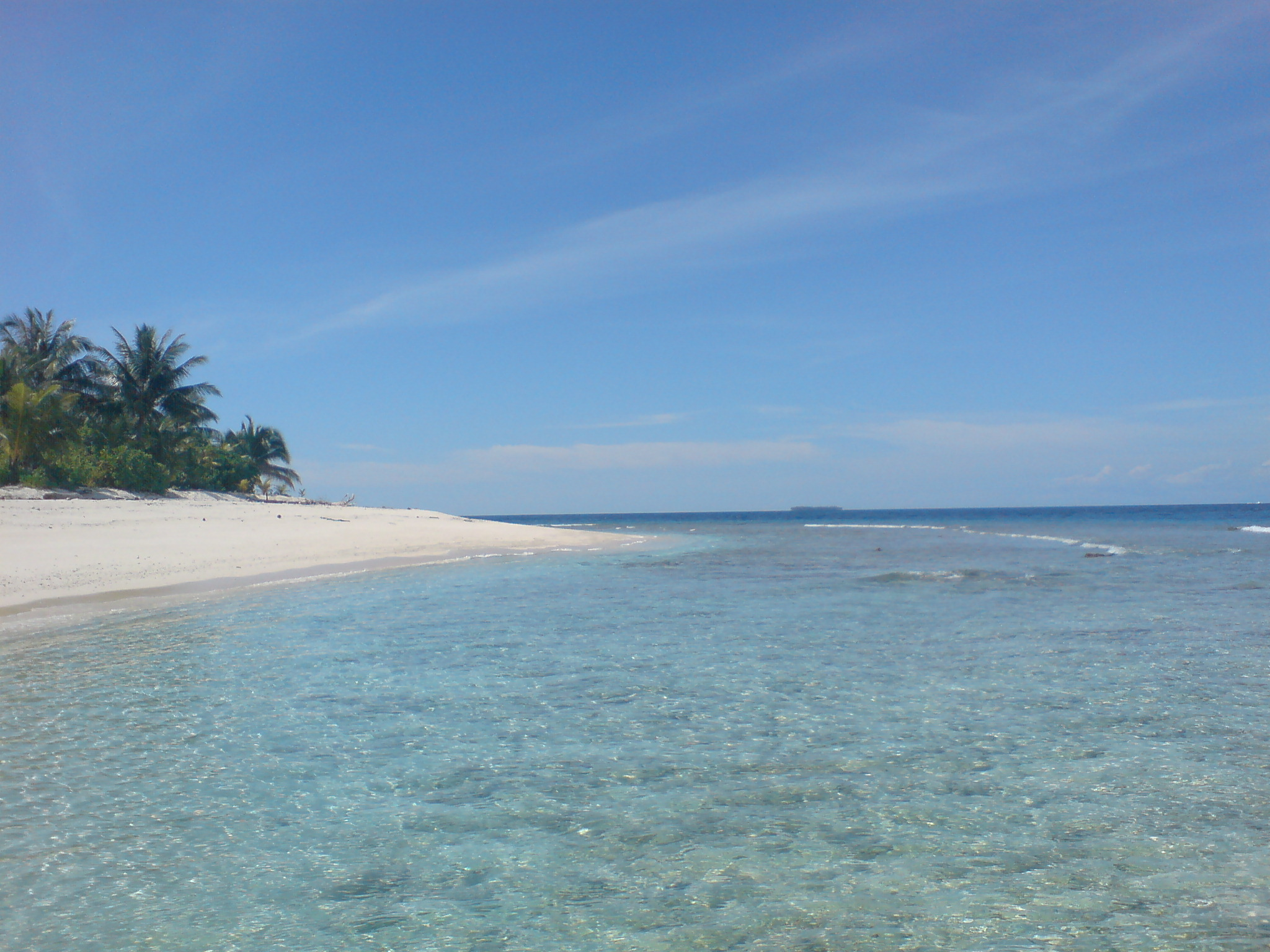 Pantai Pulau Pandan